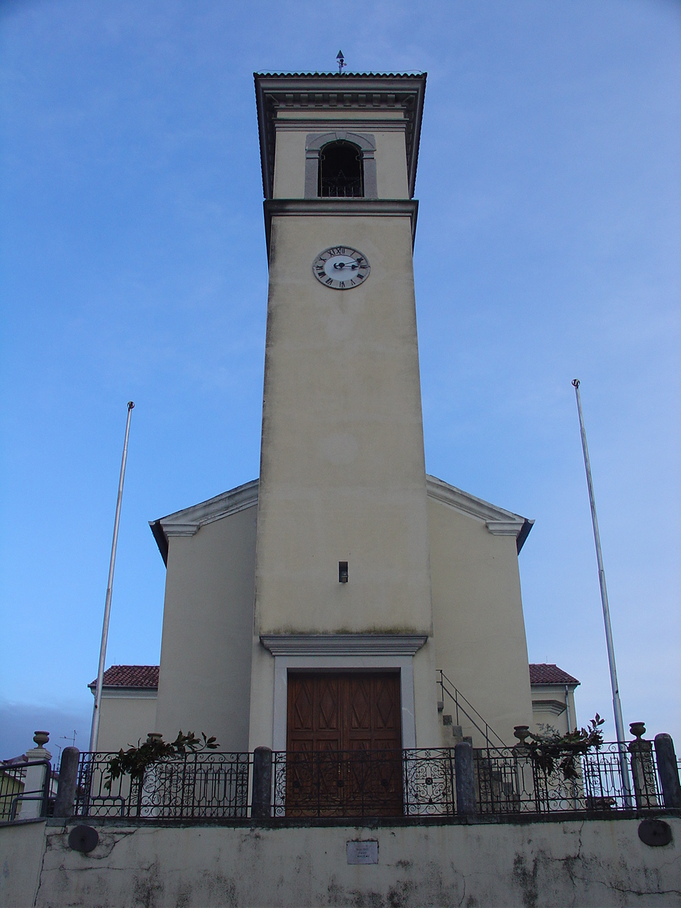 Veduta dal basso di campanile e chiesa di Orgnano